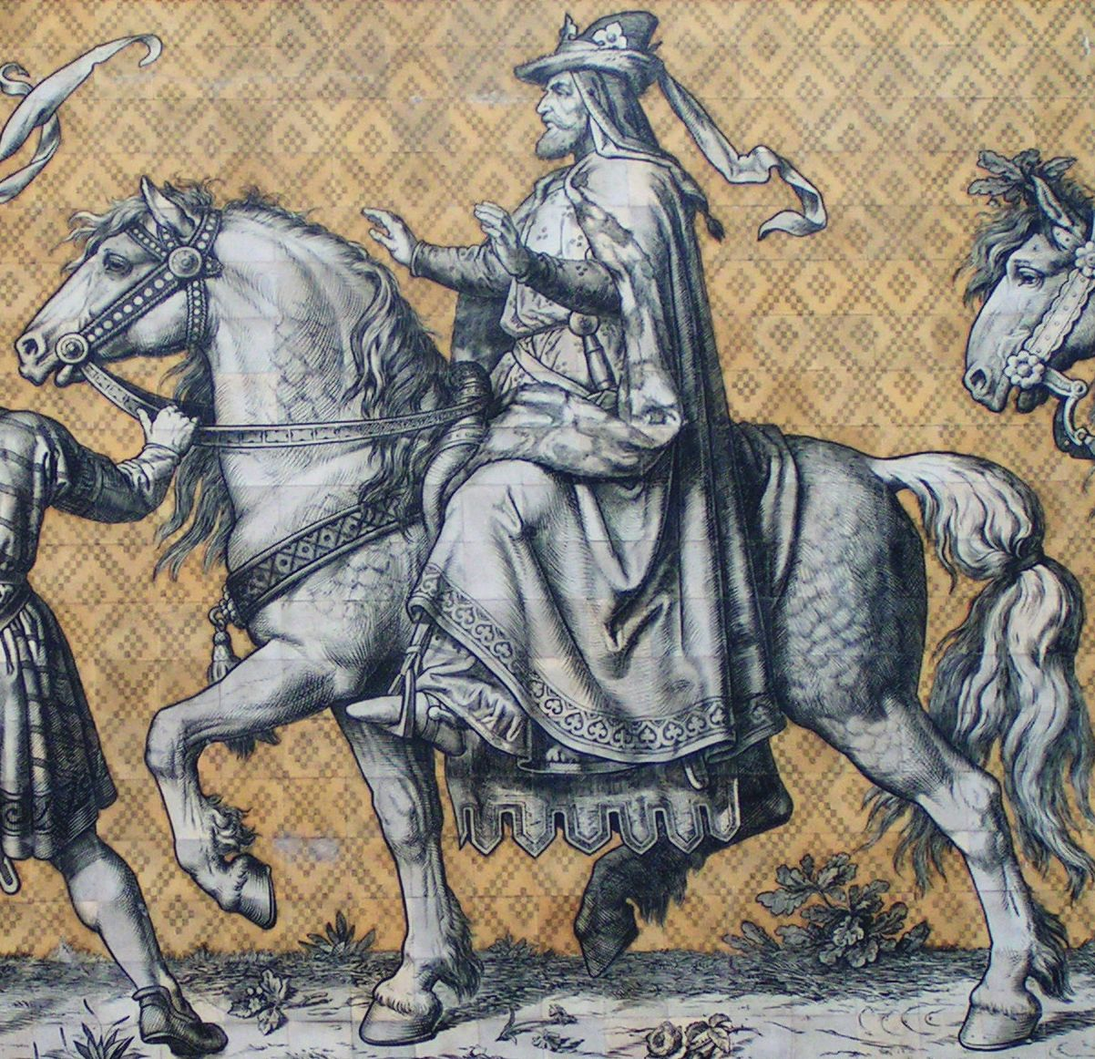 Markgraf Konrad I. (der Große) von Sachsen im Dresdener Fürstenzug